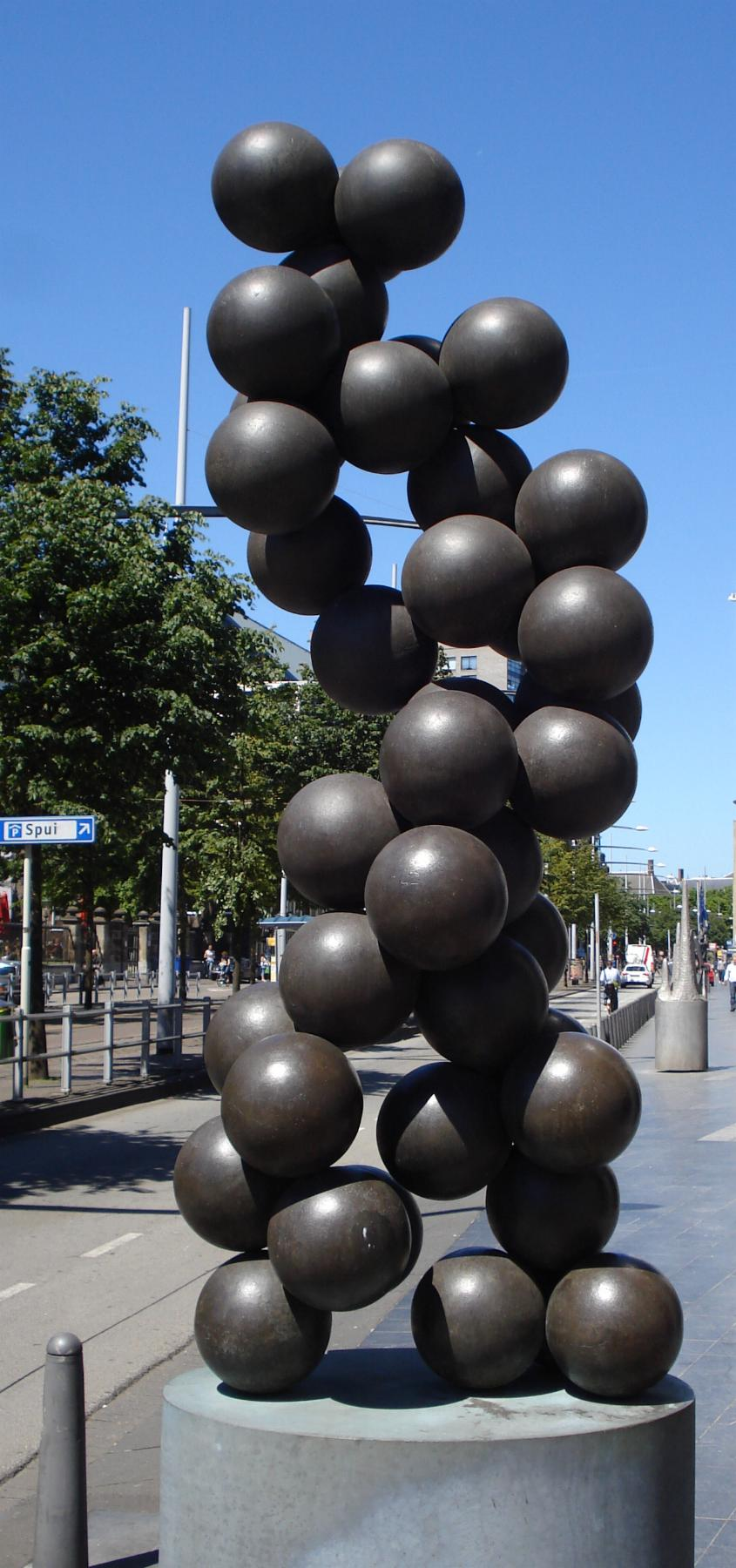 Den Haag, centrum. Kunstroute Sokkelplan. Kunstwerk zonder titel van Leo Vroegindeweij. Den Haag/The Netherlands.